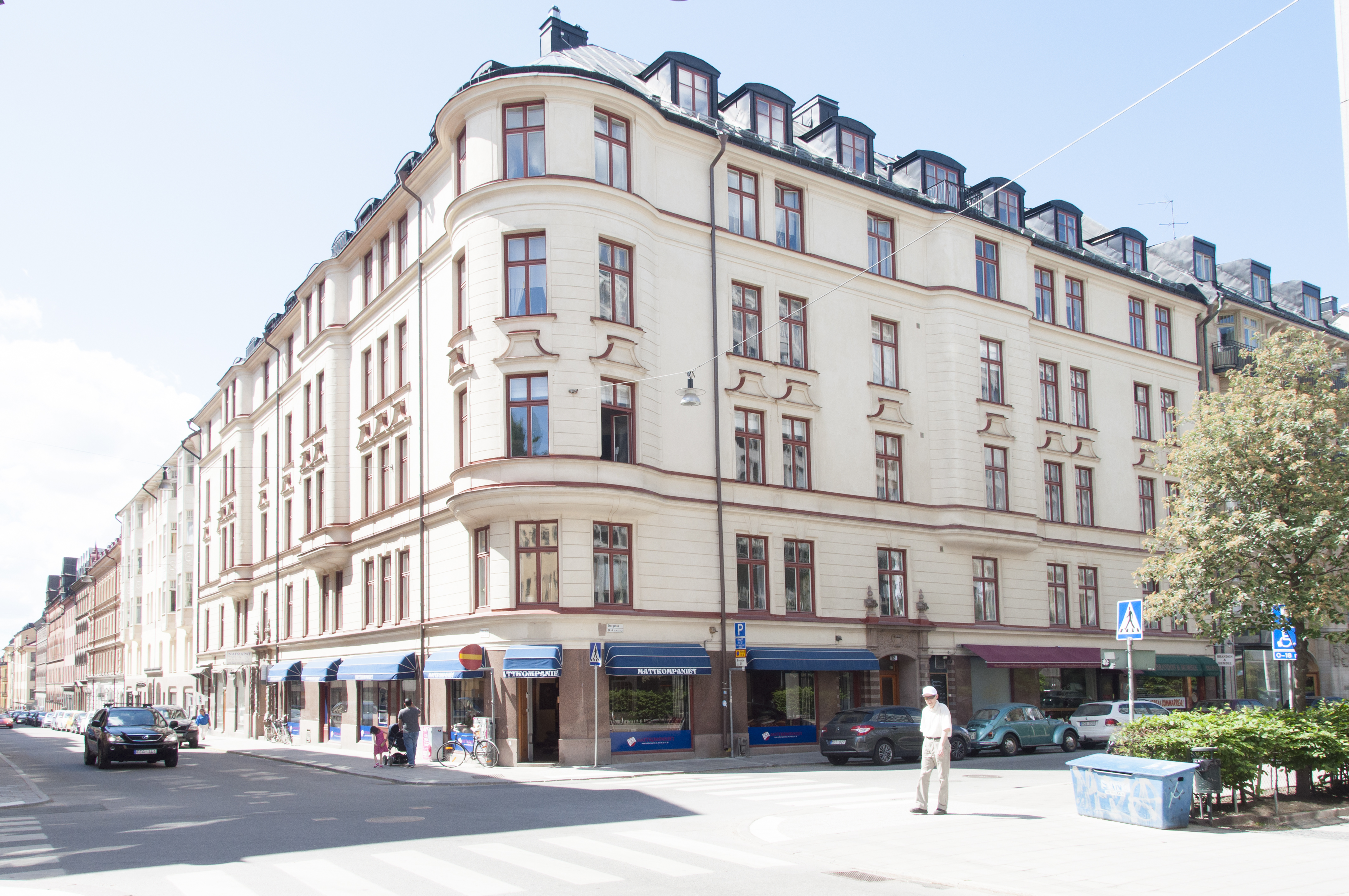 Storgatan 12, Skeppargatan 29.Byggnadsår 1905-06, arkitekt Sam Kjellberg, byggherre J Andersson & K Svensson, byggmästare J Andersson & J Hjelm.